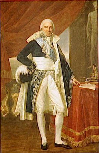 Jean-Baptiste Collin, comte de Sussy (1750-1826)